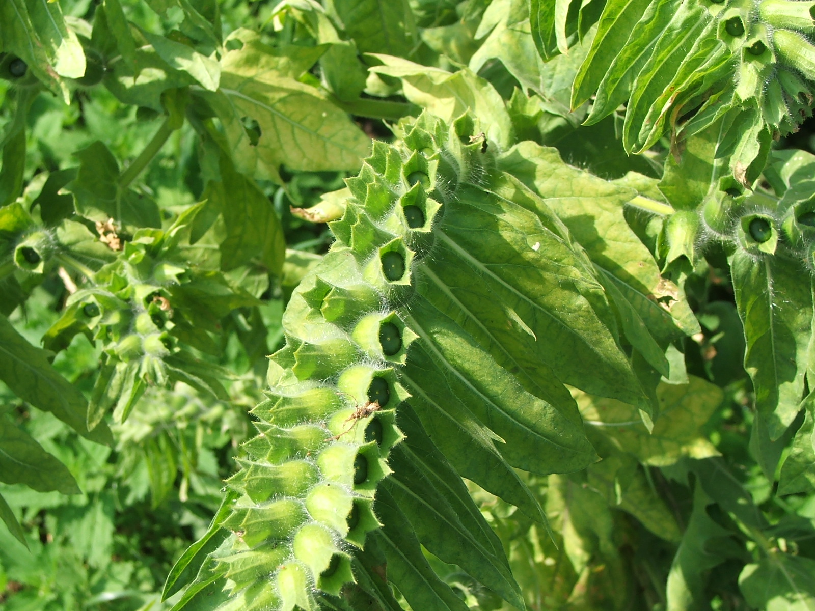 Hyosciamus niger